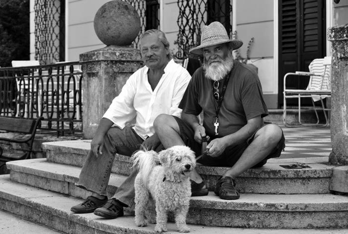 Ráduly Mihály jazz-zenész és Béres János szobrász.